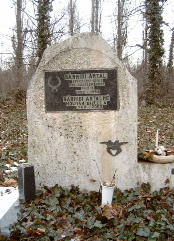 Bánhidi Antal (Szatmárnémeti, 1903. (1902?) december 23. - 1994. március 18. (április?) Széchenyi-díjas repülőgéptervező mérnök, sportrepülő, számos magyar repüléstörténeti rekord felállítójának sírja Budapesten. Kerepesi temető: 47-1-130 [szobrász: Hajagos Károly]